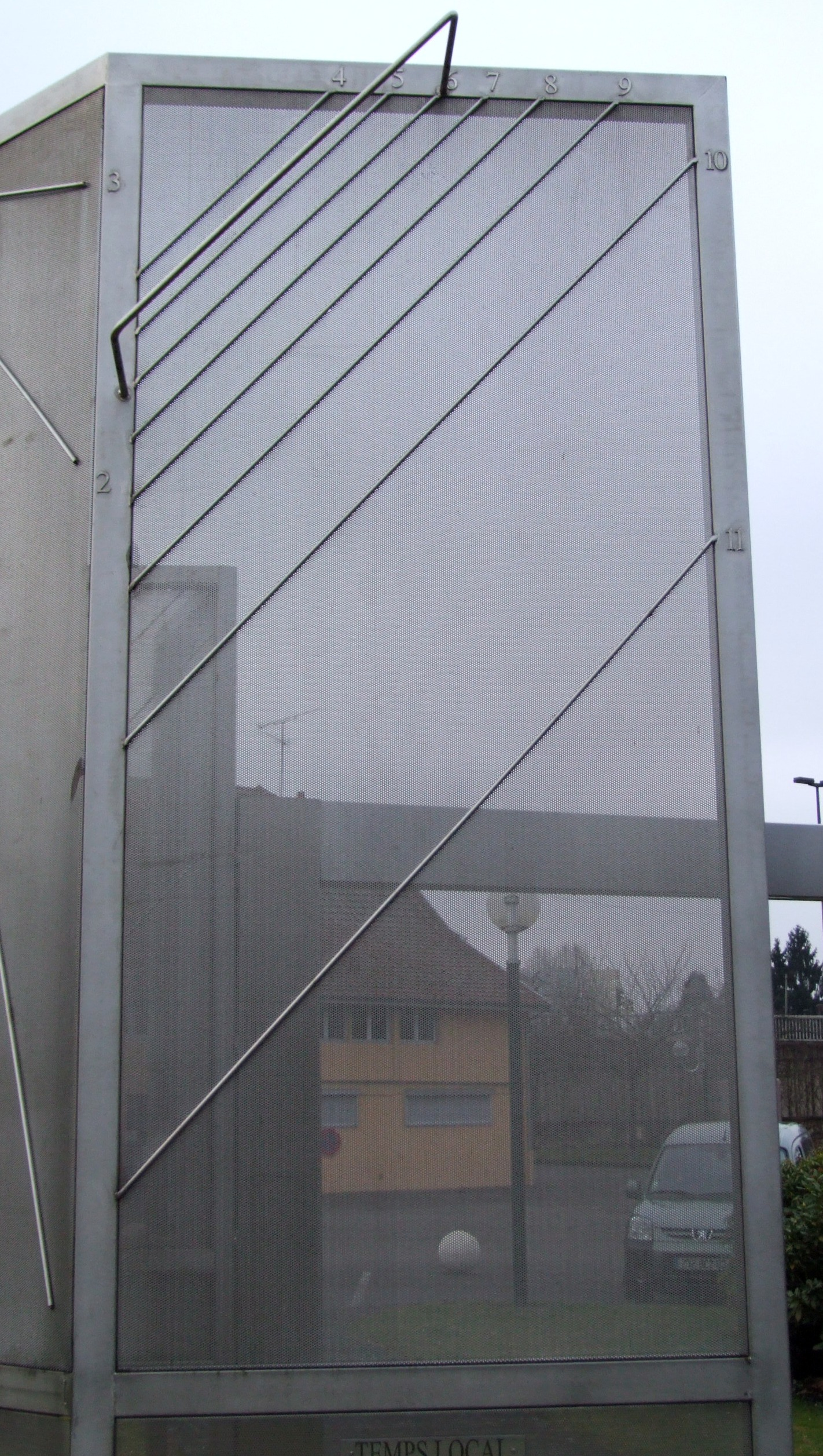 Cadran solaire, Parc scientifique du Près-la-Rose, Montbéliard, Doubs, Franche-Comté, FRANCE